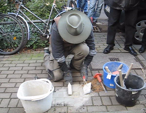 Verlegung des Stolpersteins für Albert Richter in Köln-Ehrenfeld, Sömmeringstr. 70, Gunter Demnig